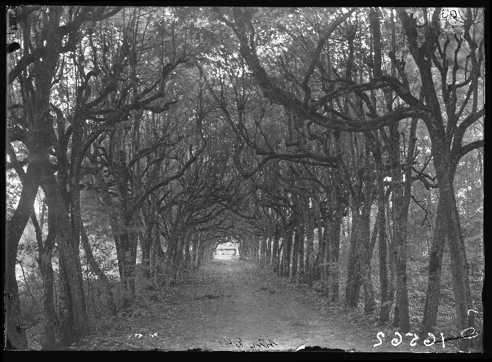 Беларуская (тарашкевіца): Камянпольле (Kamianpolle), сядзіба Мірскіх (Mirski). Грабавая прысада